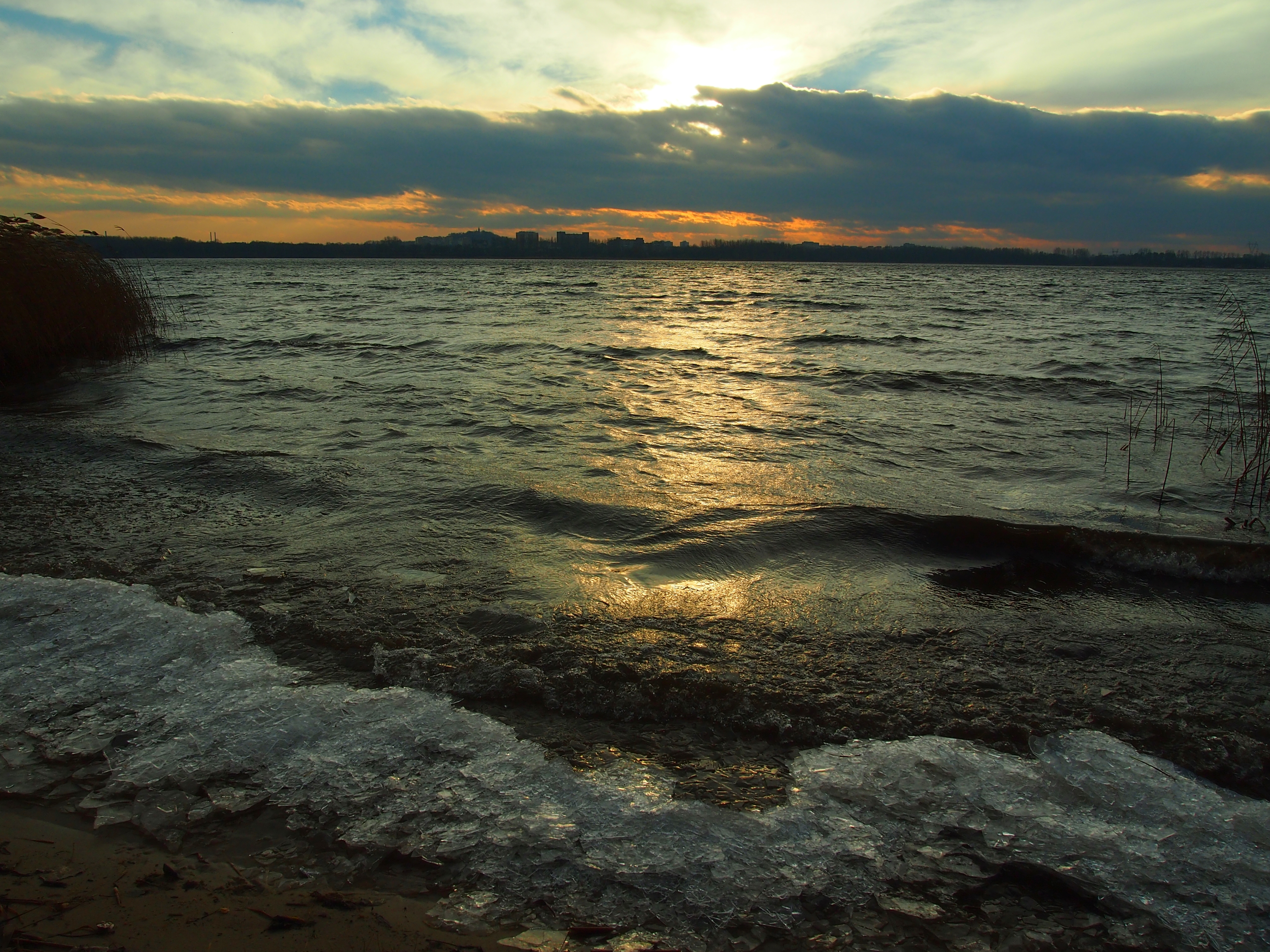 Zbiornik Pogoria III – zbiornik poeksploatacyjny (popiaskowy) w zlewni cieku Pogoria pochodzący z lat 70. XX wieku (lata 1973-1975). Powierzchnia lustra wody przy maksymalnym poziomie piętrzenia wynosi 208 ha, długość – 2,0 km, szerokość średnia – 1,0 km, szerokość maksymalna – 1,5 km, wskaźnik wydłużenia zbiornika – 1,34. Linia brzegowa ma długość 6 km. Jezioro poeksploatacyjne ma pojemność 12 mln m³, przy czym głębokość średnia wynosi 5,8 m, a maksymalna ok. 16 m[1].Zbiornik spełnia funkcje przyrodnicze i krajobrazowe mimo statusu rezerwowego źródła wody do celów przemysłowych (pobór wody na szerszą skalę zaniechany od połowy lat 90. XX w. był przyczyną wahań stanów wody o amplitudzie przekraczającej 1 m). Posiada słabo rozwiniętą bazę noclegową i gastronomiczną, a także towarzyszącą, co nie przeszkadza pełnić funkcji turystyczno-rekreacyjnych. Jest miejscem uprawiania wędkarstwa, żeglarstwa, sportów wodnych i nurkowania. W obrębie zbiornika objętego tzw. strefą ciszy zorganizowano kąpieliska, trasy rowerowe, szlaki spacerowe z możliwością uprawiania sportów. Pogoria III jako największy akwen w zlewni Pogorii III posiada również niewielkie znaczenie przeciwpowodziowe[1].